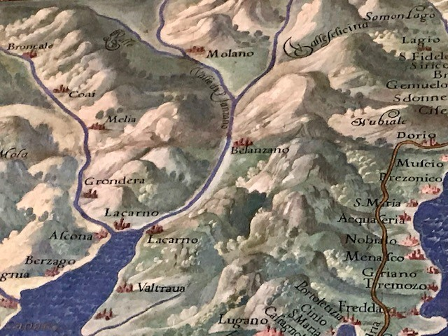 Musei vaticani - Foto galleria carte geografiche, 1580-1583